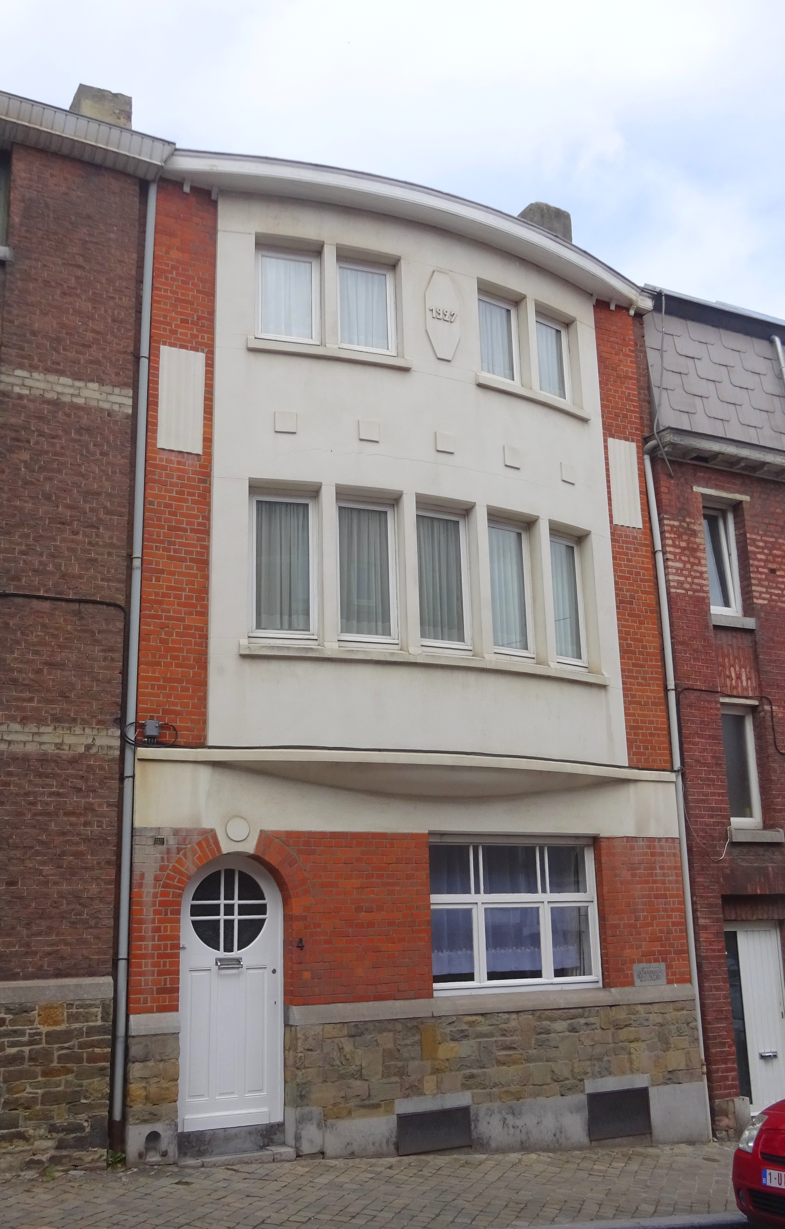 Maison datée de 1927, Rue Gustave Thiriart 4 Laveu, Liège